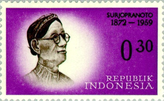 Soerjopranoto